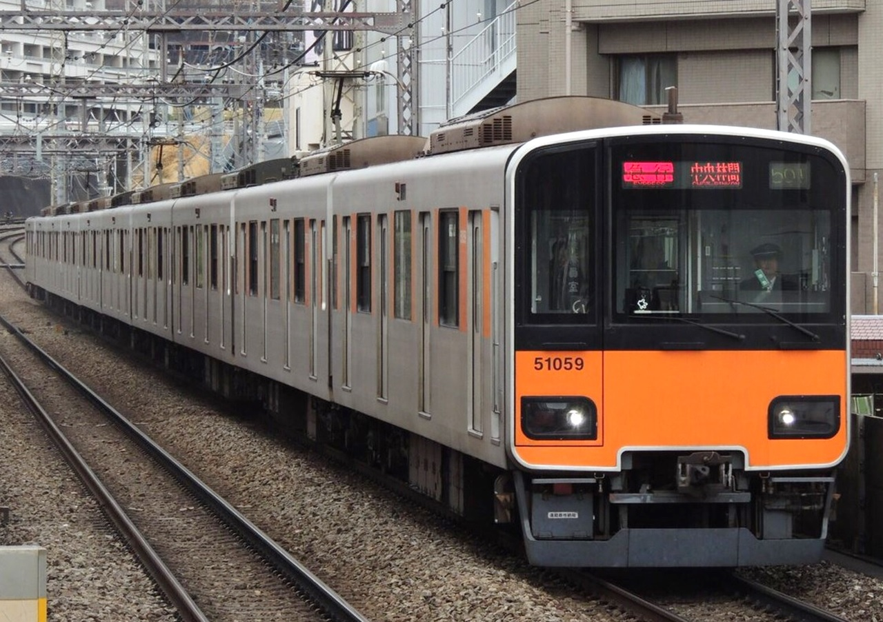 東武50050系。東急田園都市線あざみ野駅。